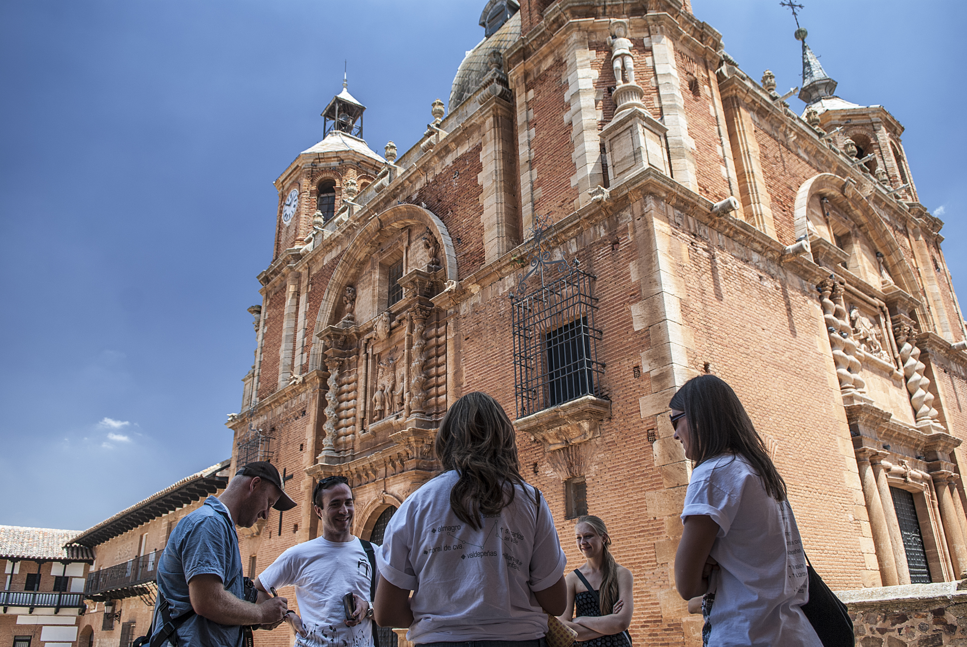 Estudiantes de español en la Plaza Mayor de San Carlos del Valle